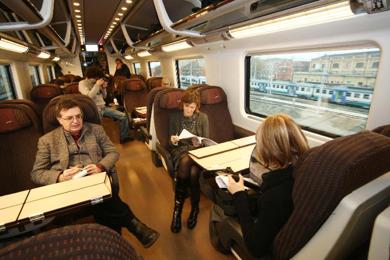 Interno di un Frecciarossa ETR 500, opera propria, 03/05/2009, l'autore sono io, copyright libero